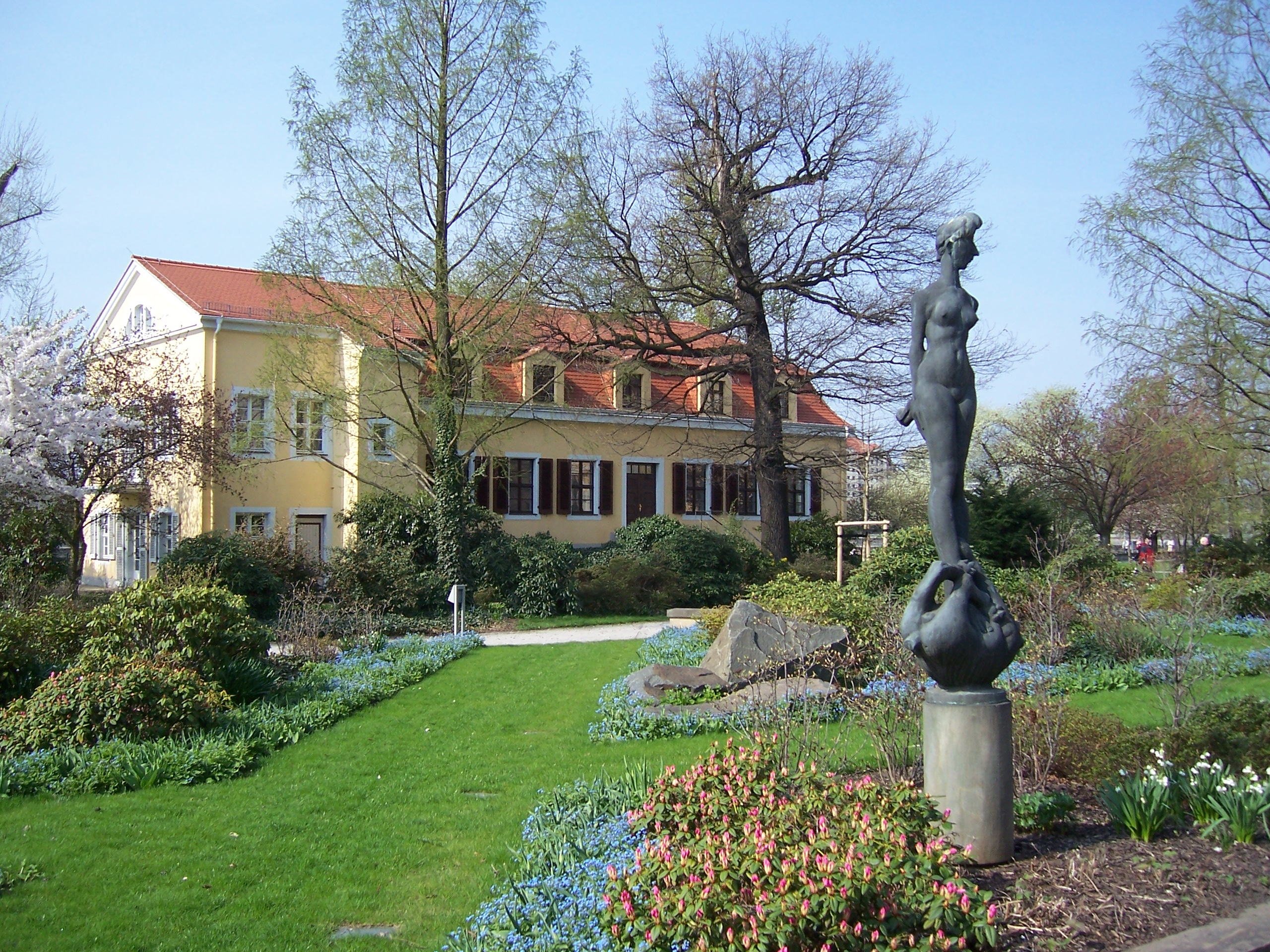 Das Vogelsche Gartenhaus, Wohnhaus des Kunsthistorikers Christian Leberecht Vogel und heute zum Hotel Bellevue gehörend, an der Elbe in Dresden (Altstadt); davor steht die Plastik „Die Schöne und das Tier“ von Detlef Reinemer.